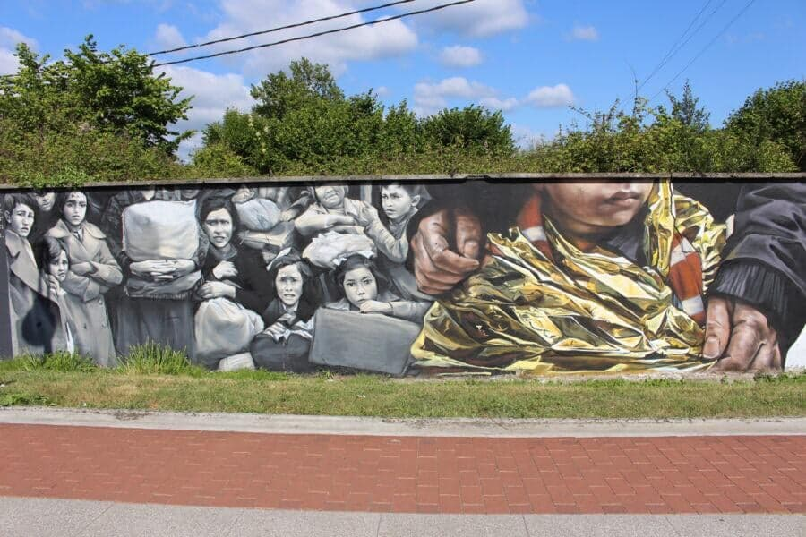 Mural de Lian Monserrate en Gernika (2020)